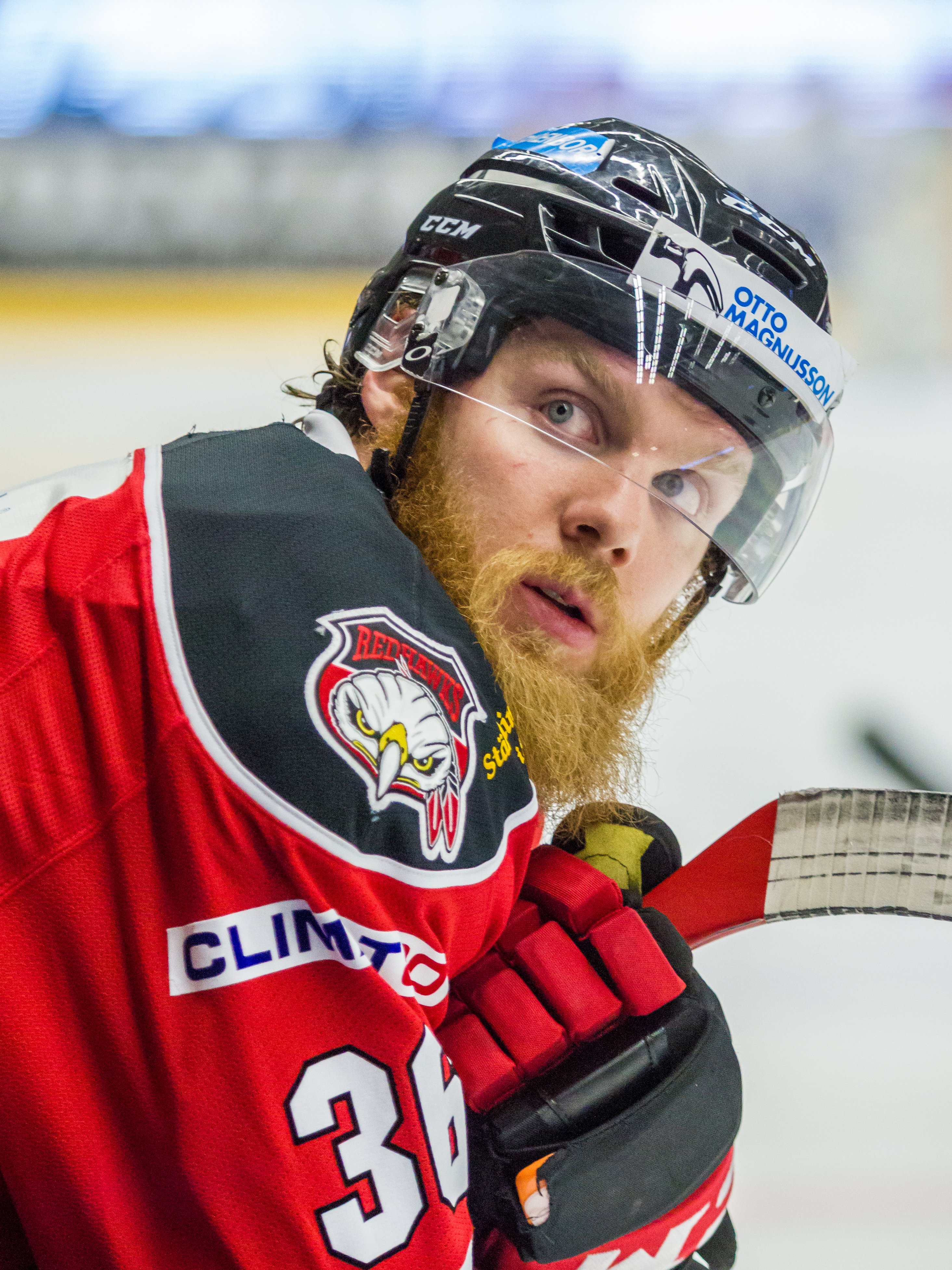 Ishockeyspelaren David Liffiton i Malmö Redhawks.